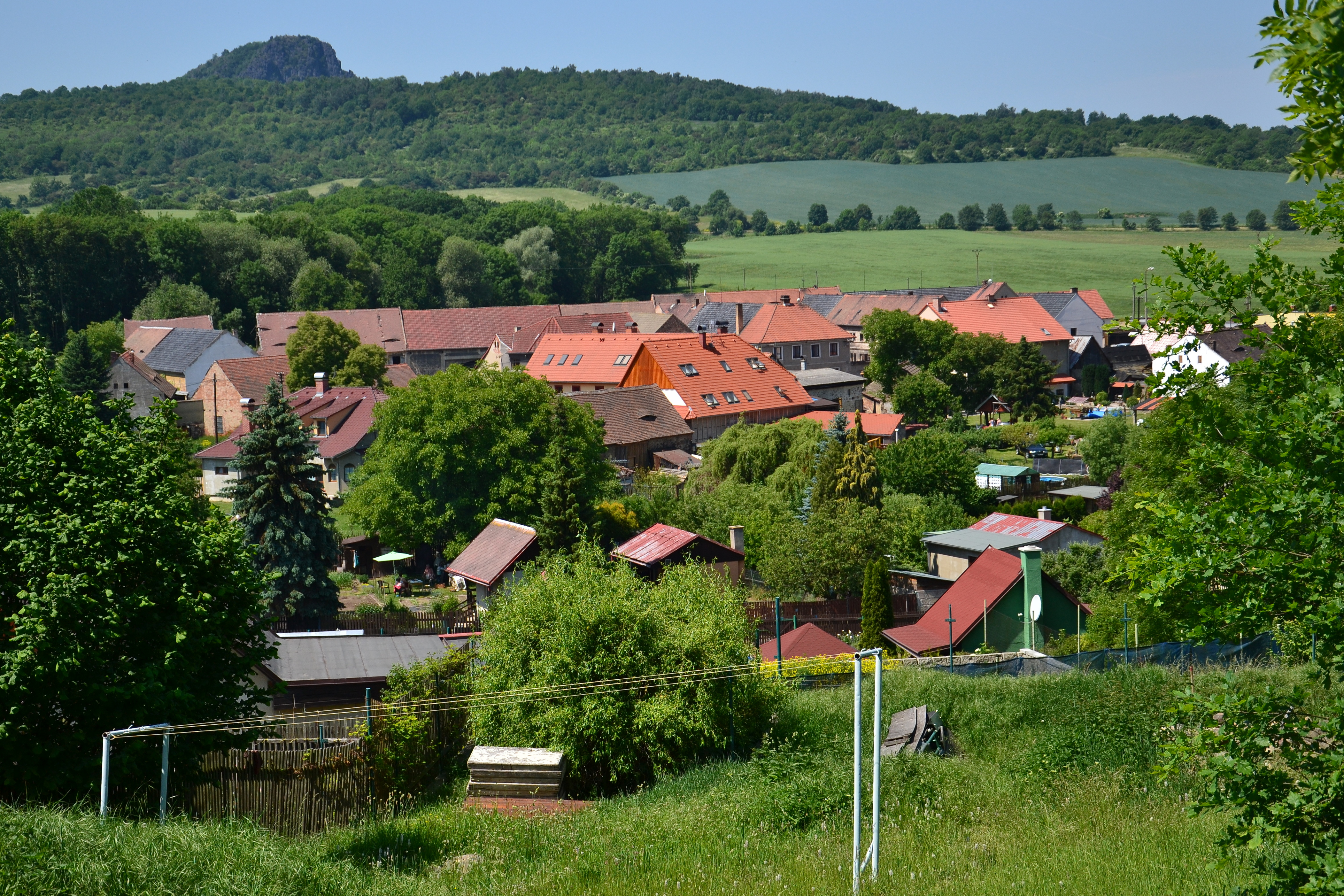 Pohled z východu